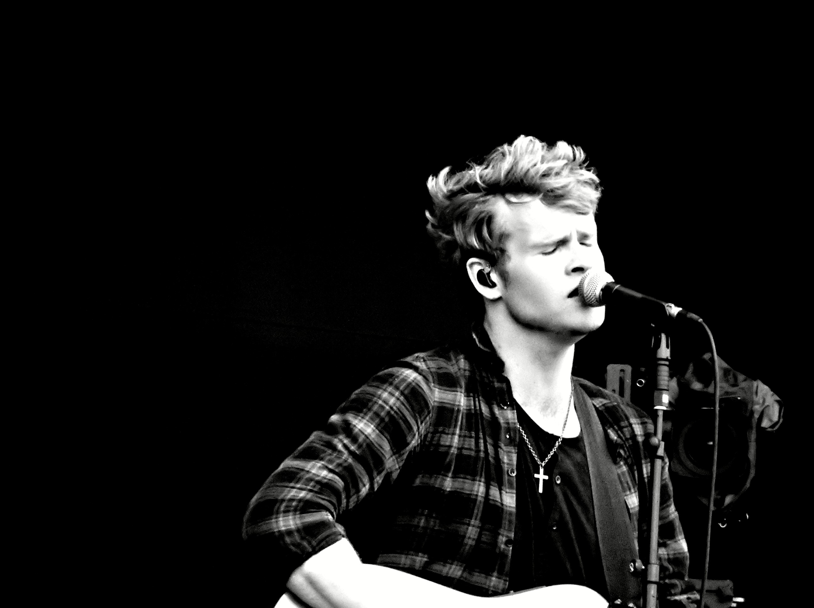 Kodaline, V Festival 2014, Chelmsford